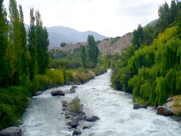 Río Yeso, Chile